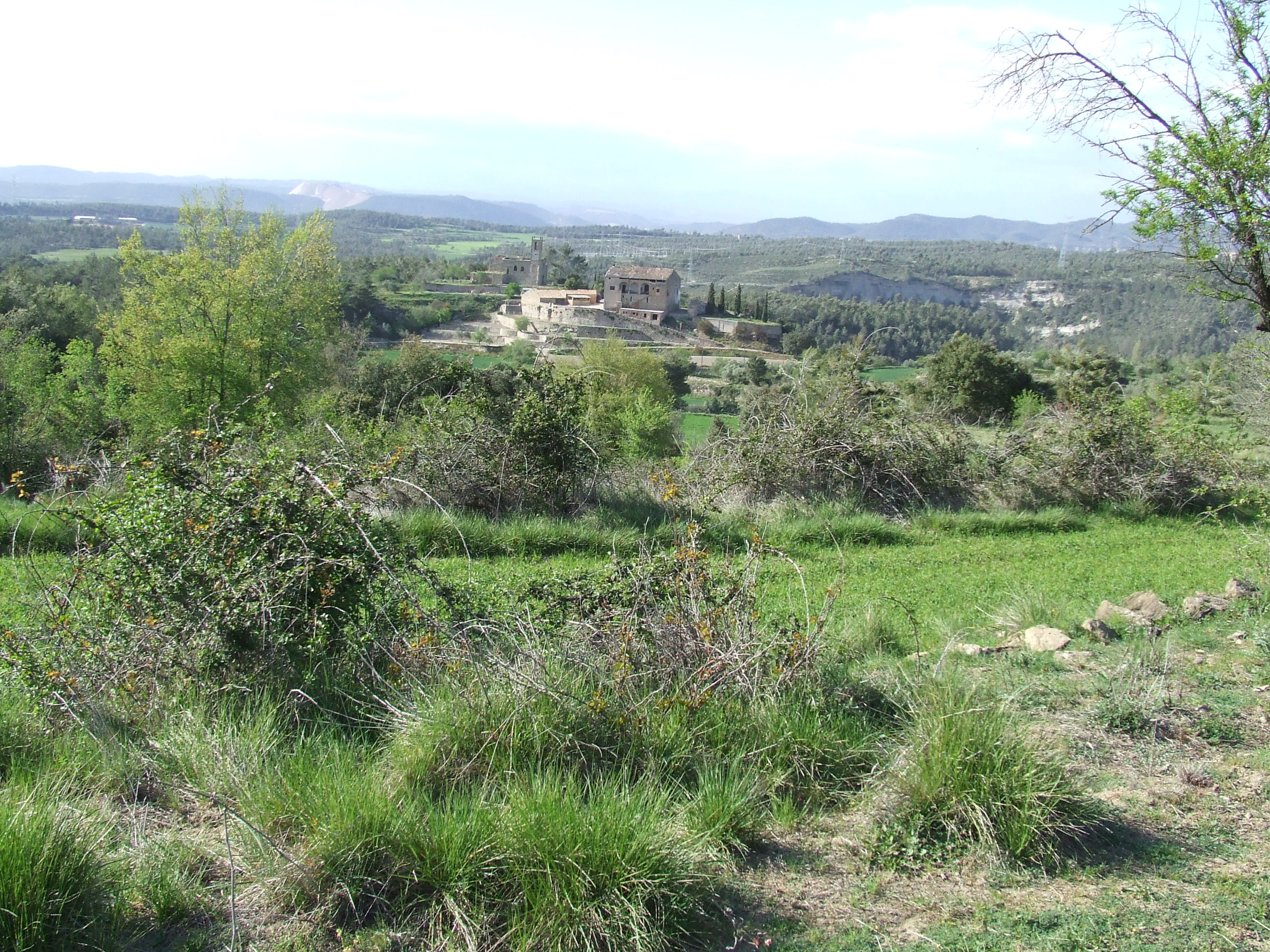 El Llucià (Viladecavalls de Calders, Calders, Moianès)